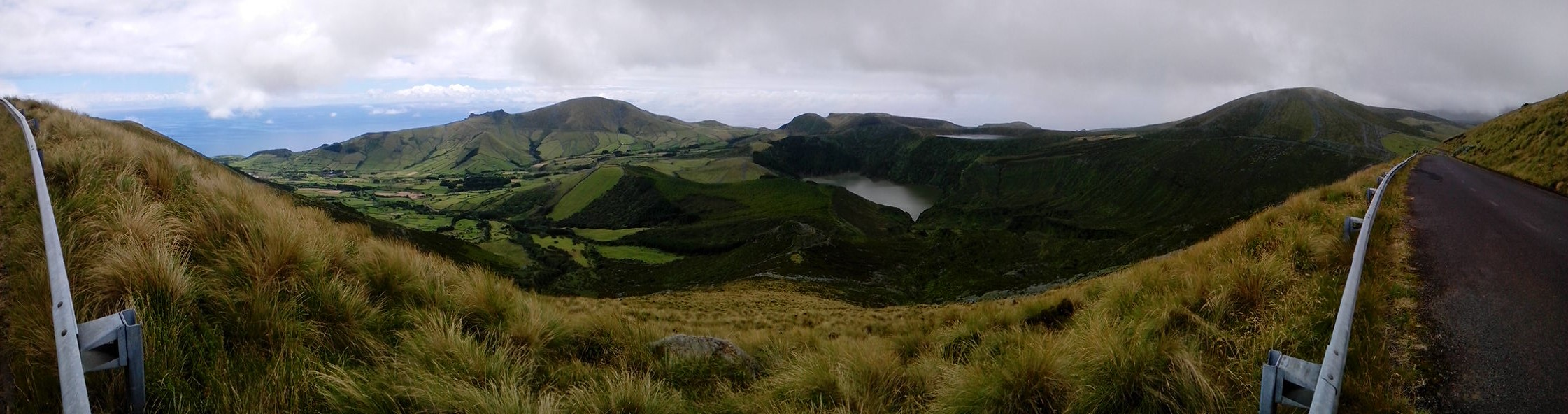 Interior da ilha das Flores, Lagoa Funda e Lagoa Rasa, ilha das flores, Açores, Arquivo de Villa Maria, ilha Terceira, Açores